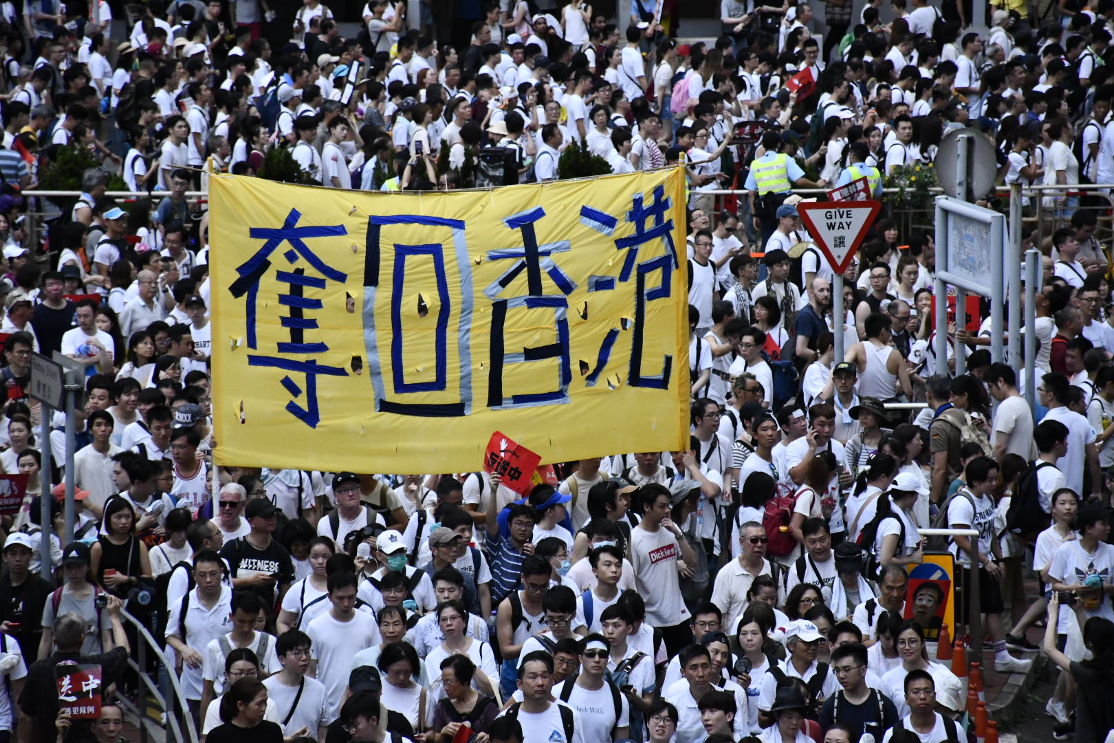 香港民陣估計103萬人參與6-9反送中大遊行，主權移交後最大規模。（美國之音湯惠芸攝）